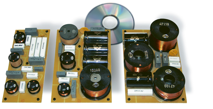 Frequenzweiche